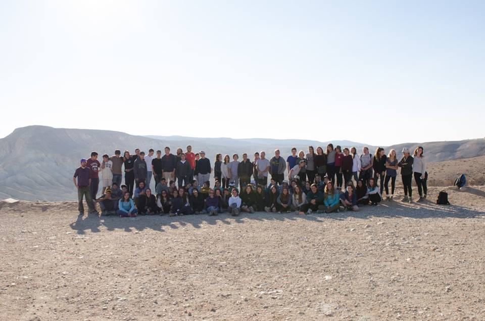 טיול חורף לשדה בוקר שארגנה ועדה צופית